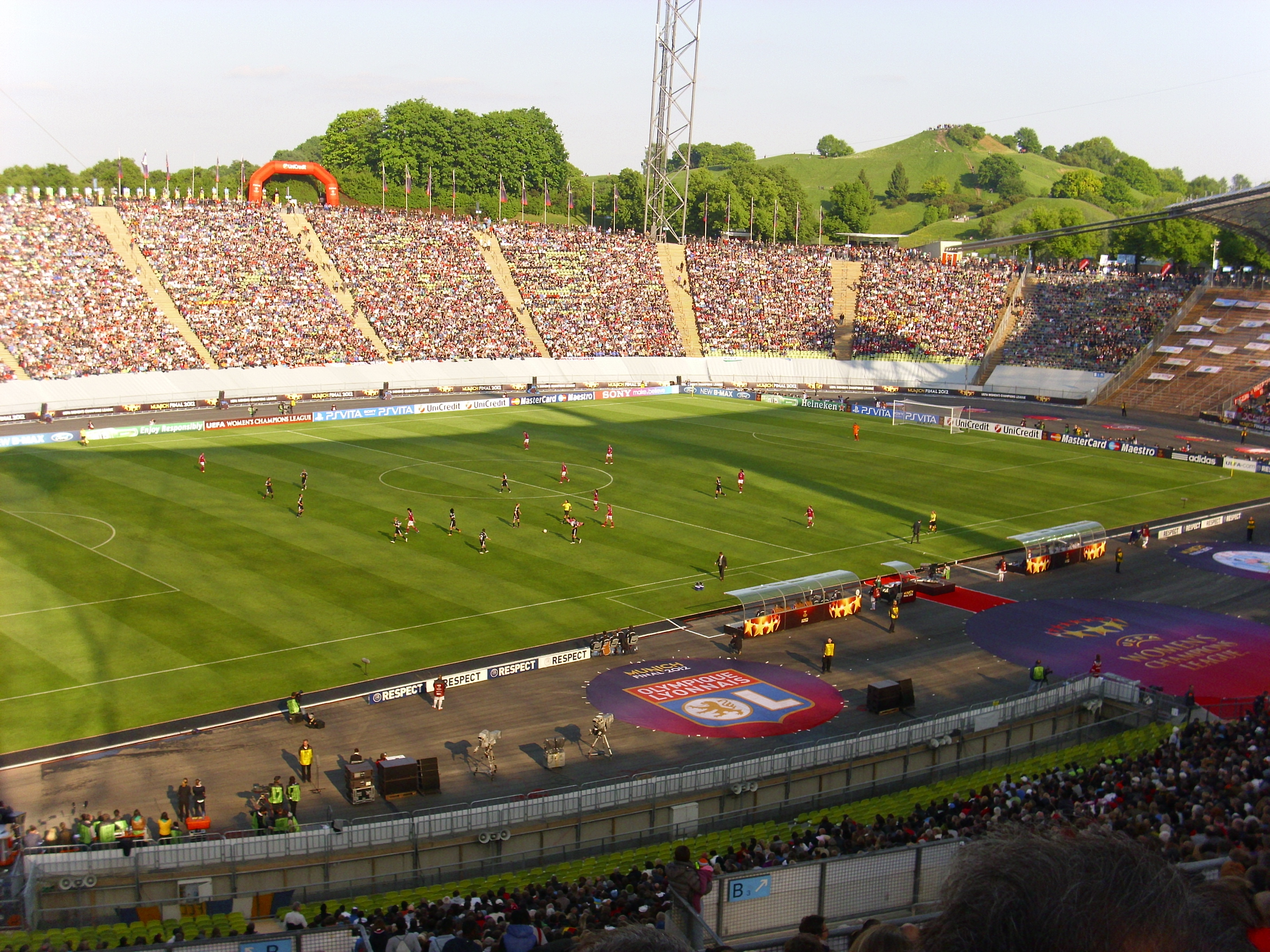 Endspiel der UEFA Women's Champions League 2011/12 im Münchener Olympiastadion. Olympique Lyon gegen 1. FFC Frankfurt (2:0)